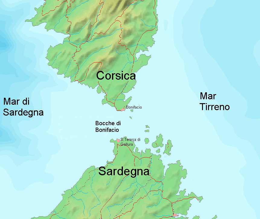 Carta geografica delle Bocche di Bonifacio